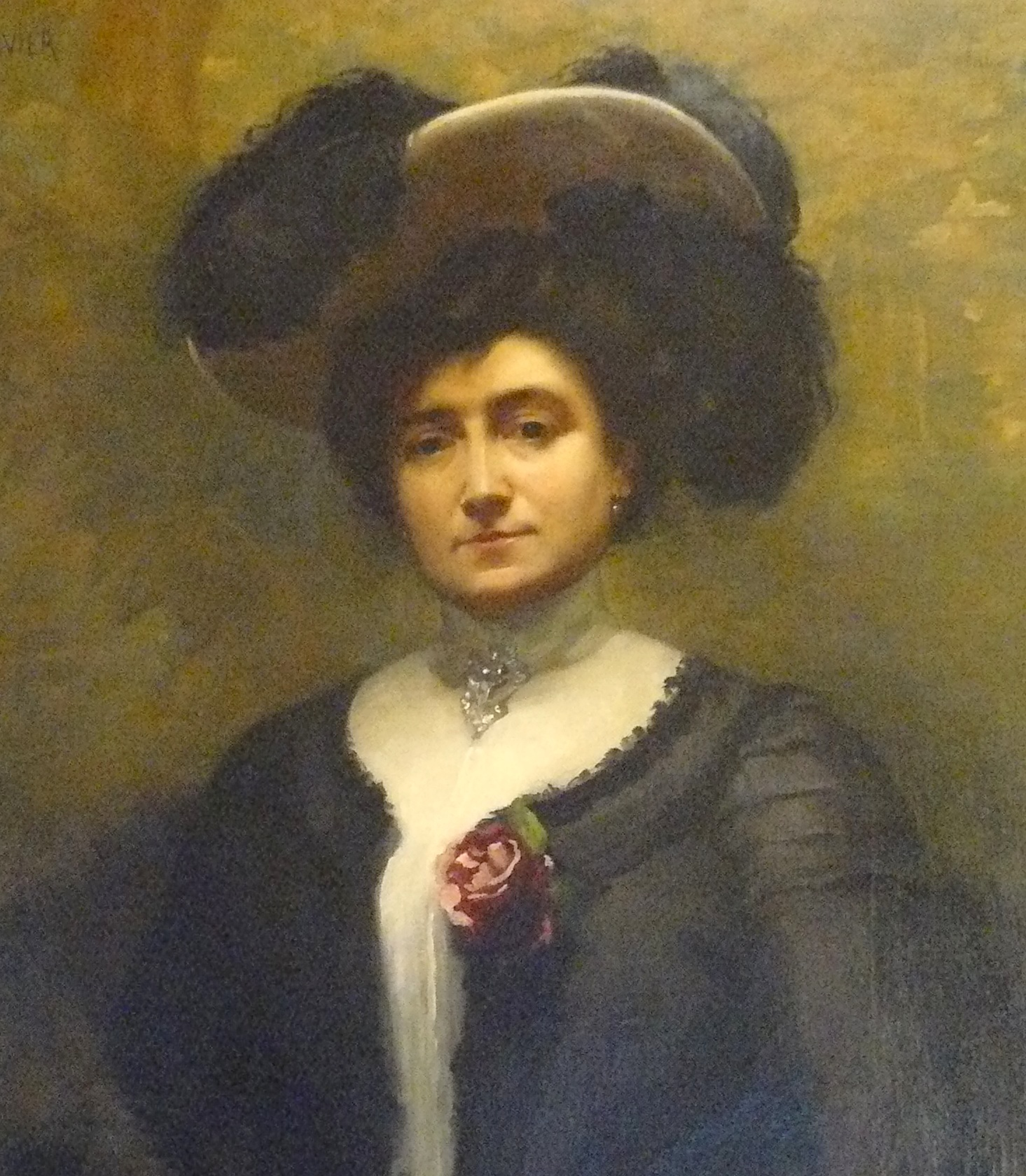 Détail du portrait en pied de Marie-Louise Jay, 1903, huile sur toile par Jeanne-Madeleine Favier (1863-1904) - Musée Cognac-Jay, Paris - acquis en 1988, inv. n°188/6